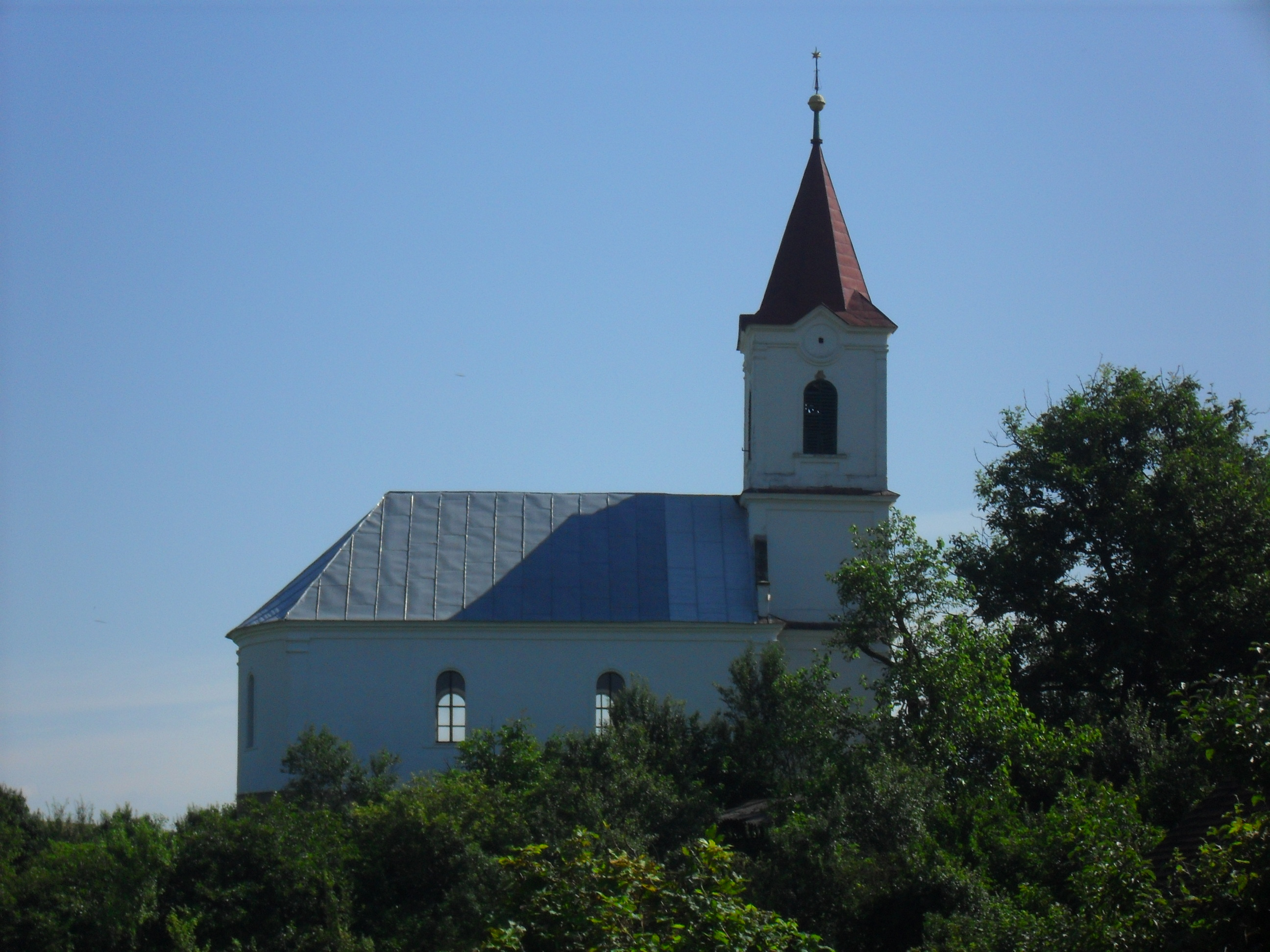 Kálosa - református templom